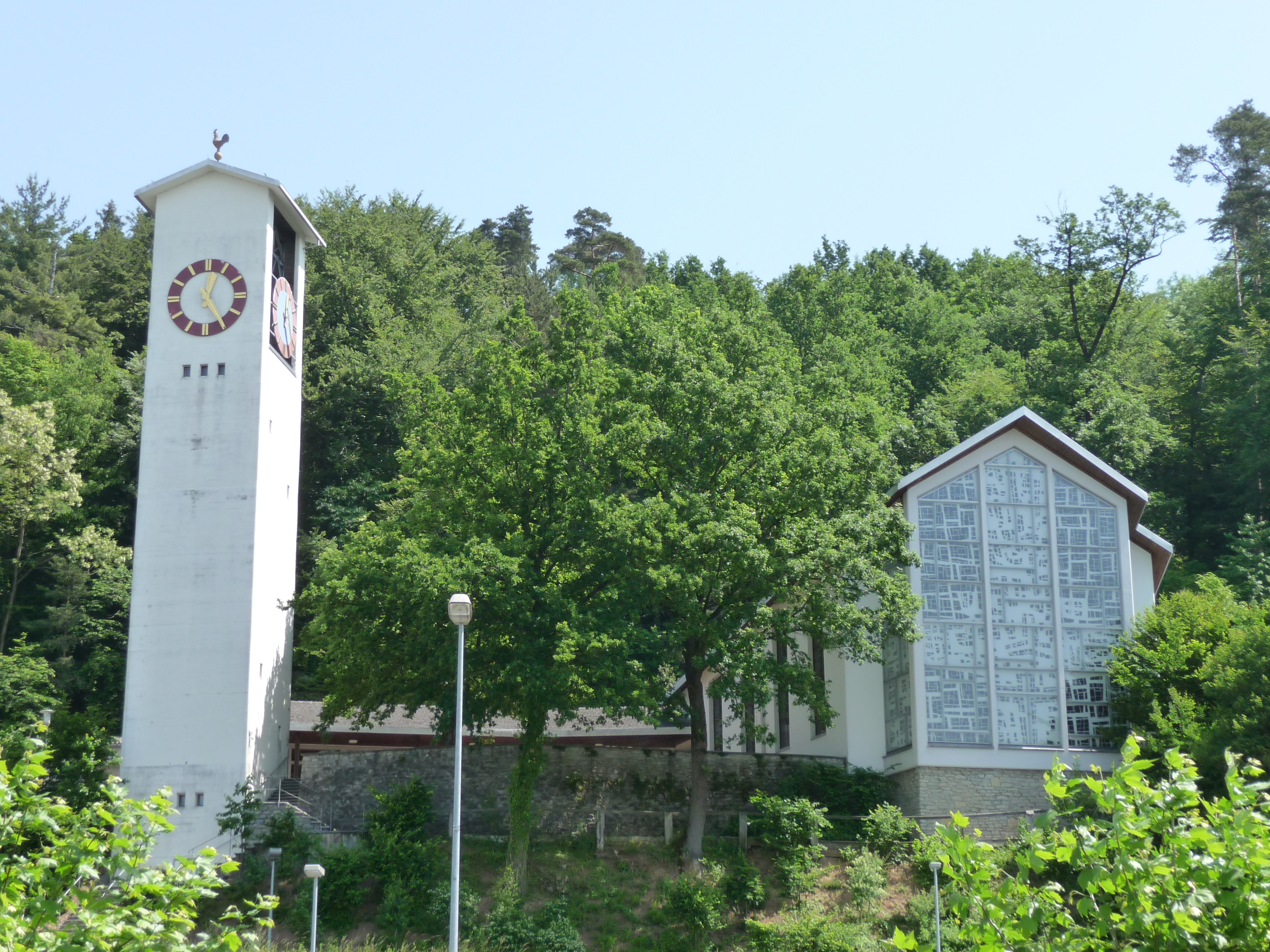 Muhen